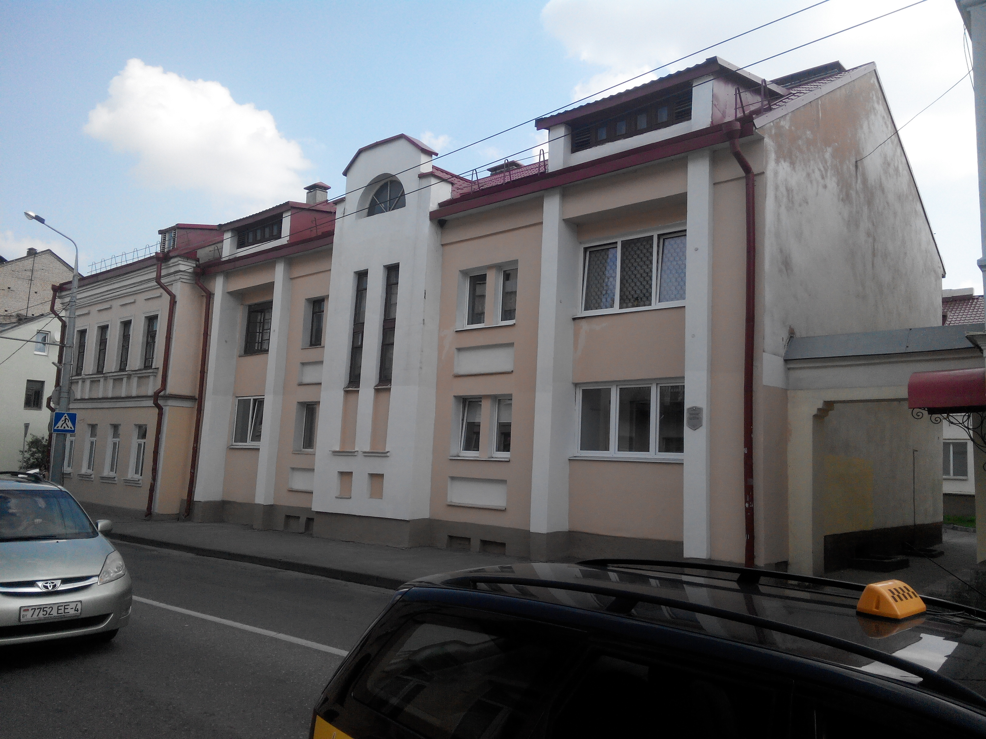 Будынак па вуліцы Вялікая Траецкая, 14, Гродна, Беларусь